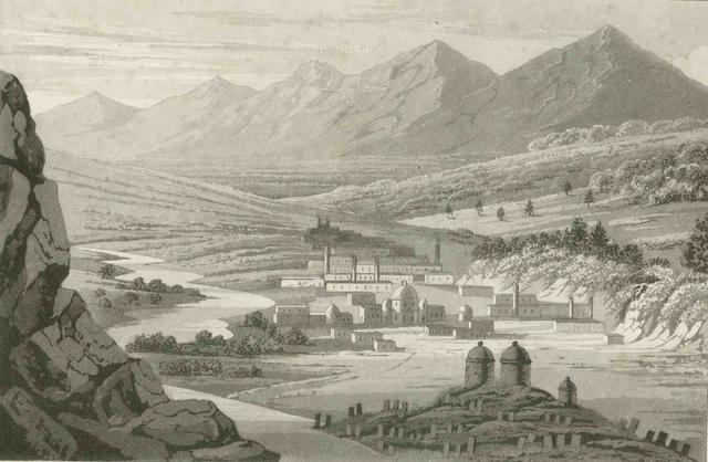 Сулейманія у 1817 р. Ілюстрація до книги Вільяма Еда “Подорож до Перської затоки та мандрівка суходолом з Індії в Англію у 1817 році..." (Sulaymaniyah. Book Illustration of “A voyage up the Persian Gulf and a journey overland from India to England, in 1817. Containing notices of Arabia Felix, Arabia Deserta, Persia, Mesopotamia, the Garden of Eden, Babylon, Bagdad, Koordistan, Armenia, Asia Minor, &c. &c”, By William Heude)